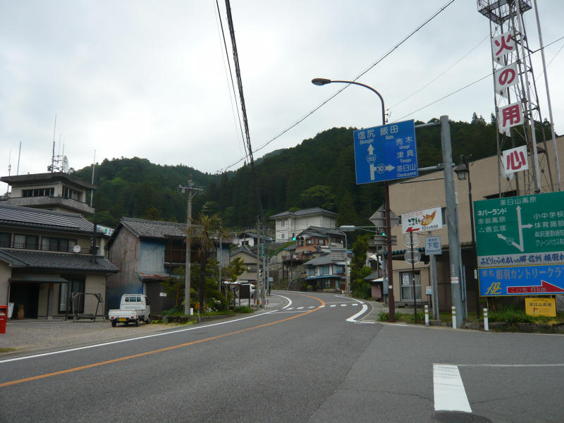 根羽村中心部